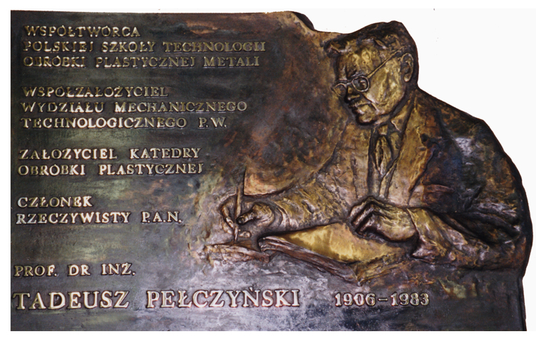 Tablica upamiętniająca Tadeusza Pełczyńskiego